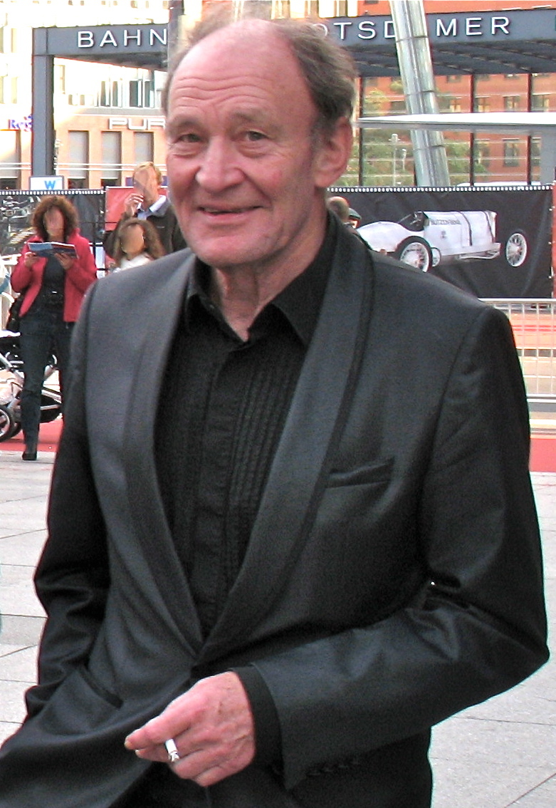 Michael Mendl in Berlin bei der Eröffnung von Boulevard der Stars